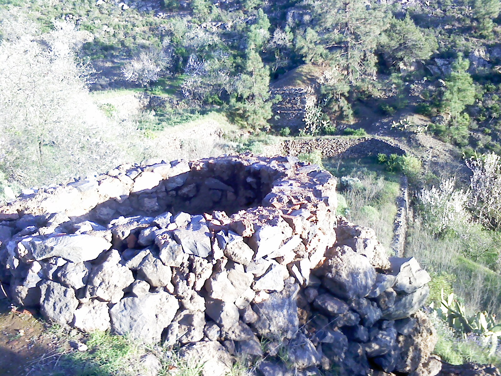 Hornos de Teja localizado en el núcleo poblacional de Aripe